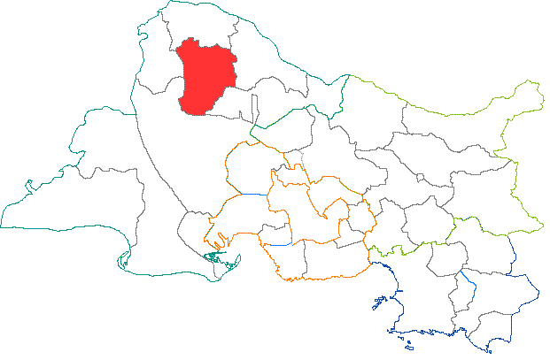 Situation du canton dans le département des Bouches du Rhône (France)